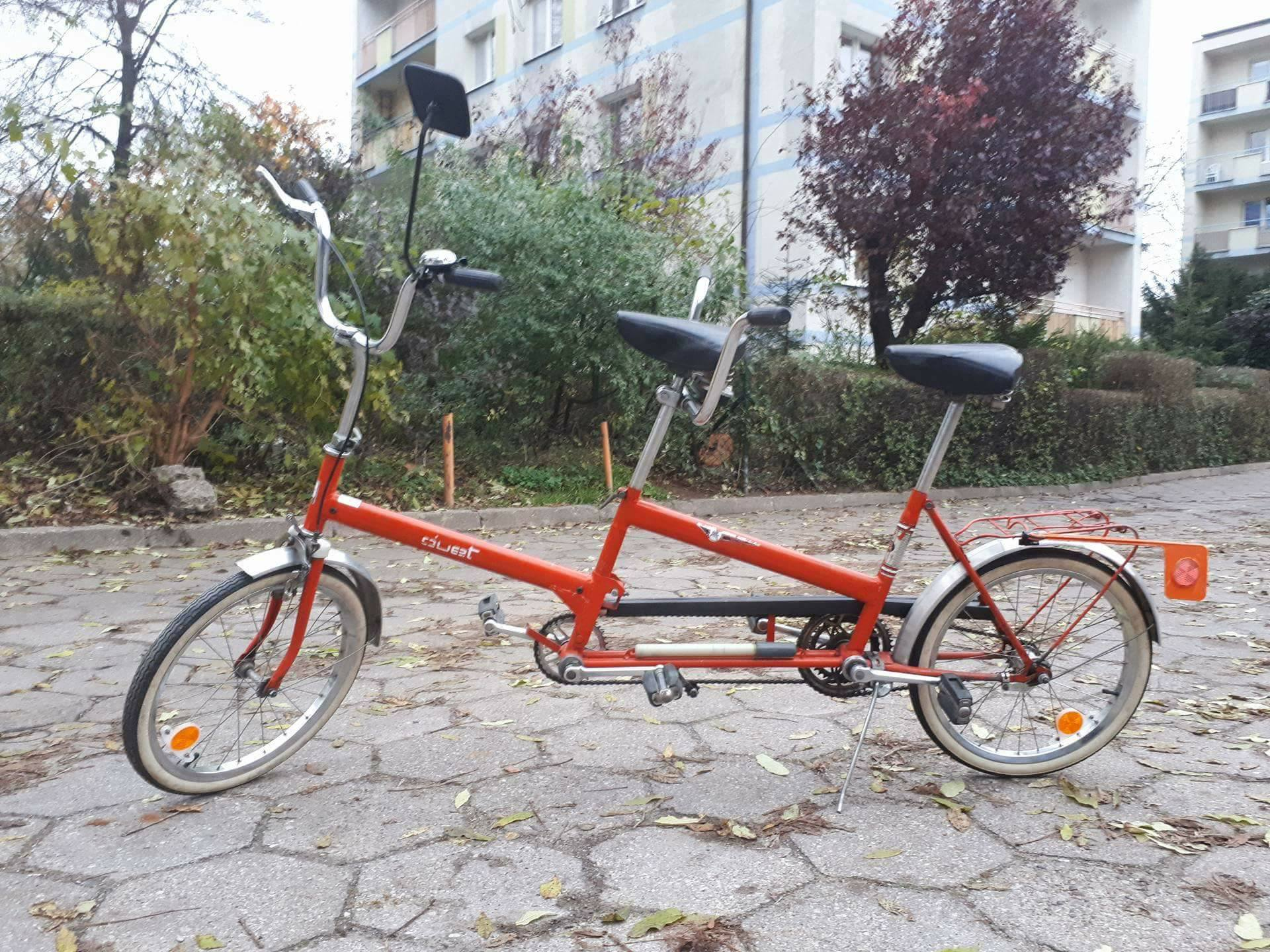 Romet Duet z 1975r. Listopad 2017, Poznań